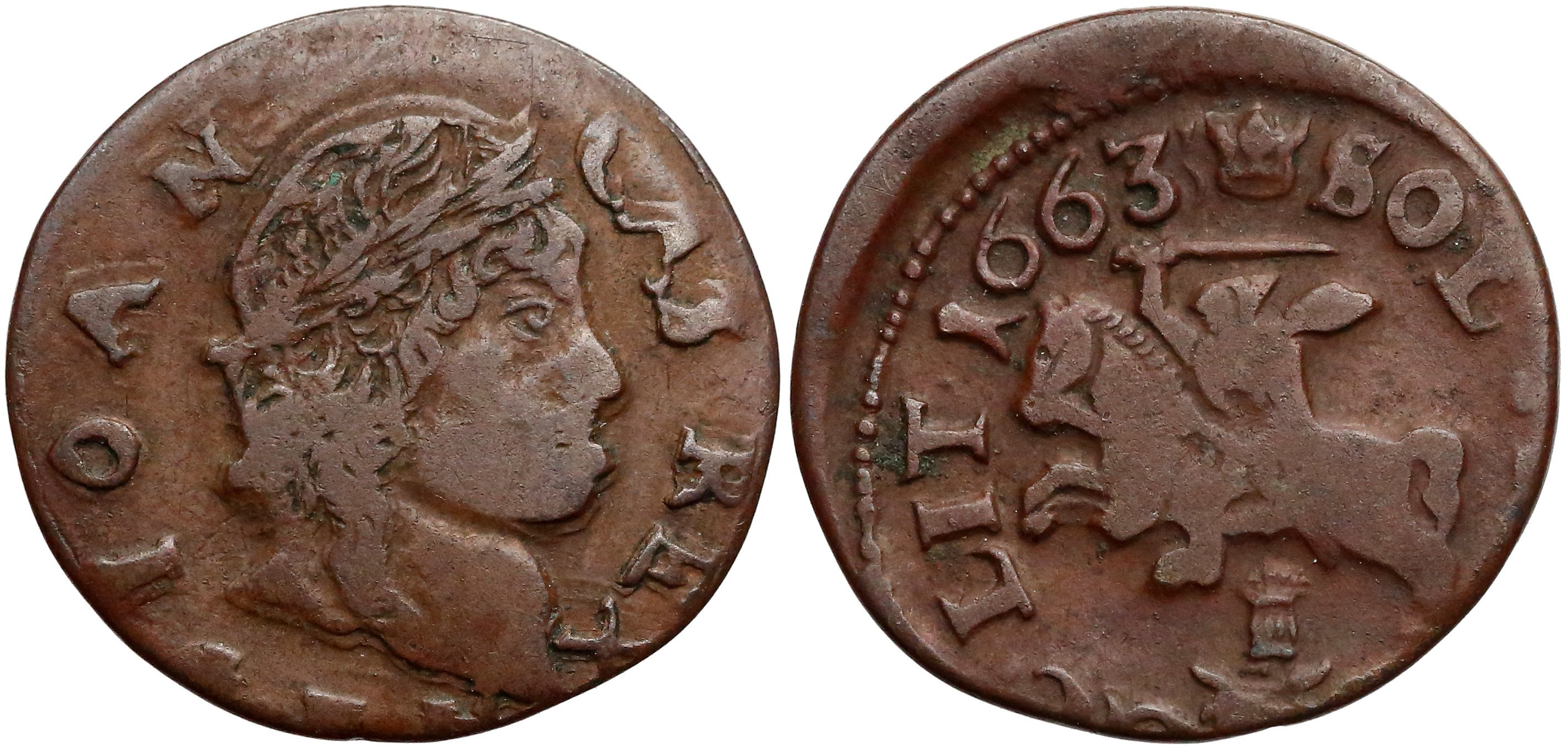 Boratynka litewska 1663 Oliwa